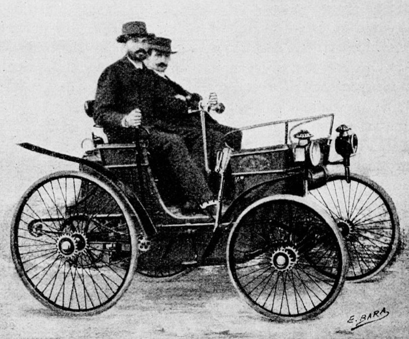 Louis Rigoulot et Auguste Doriot au Paris-Brest-Paris 1891 sur Peugeot Type 3 - L'Almanach des Sports 1899 sous la direction de Maurice Leudet , librairie Paul Ollendorff, p.107